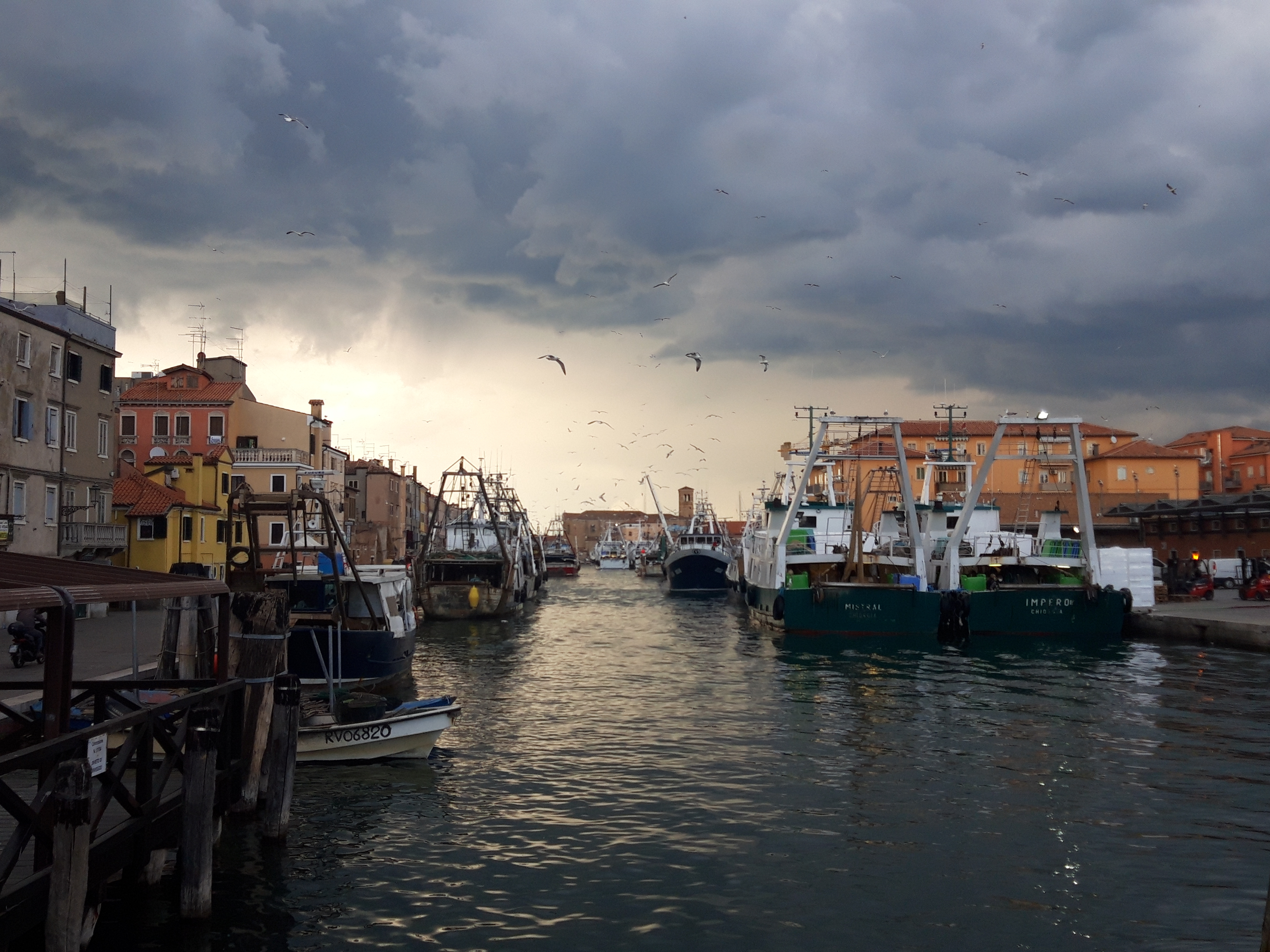 raccordo ferroviario Val da Rio